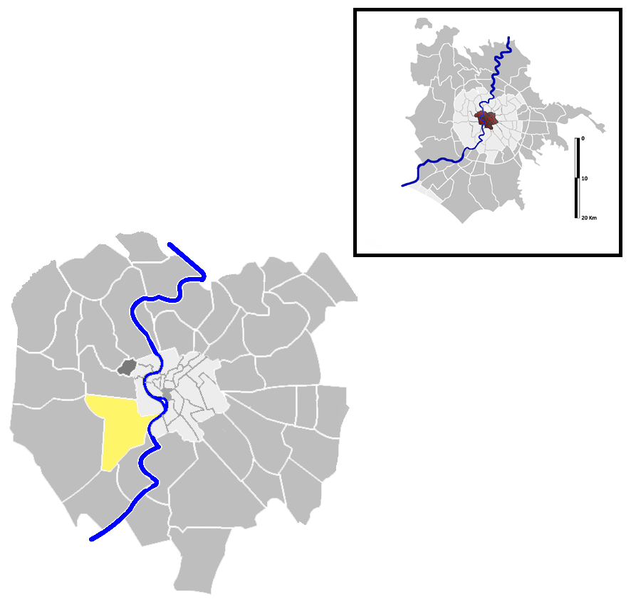 Gianicolense